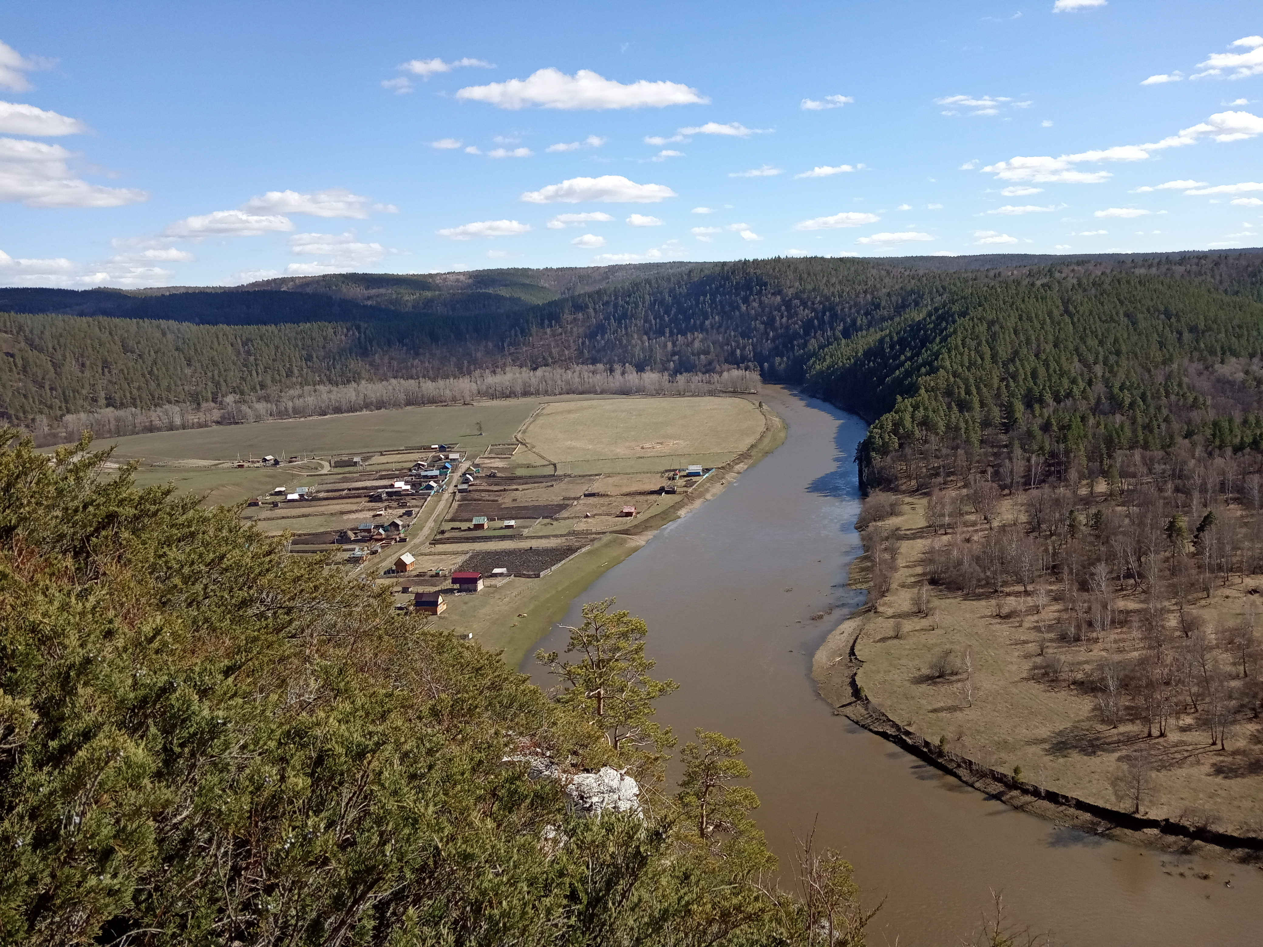 Деревня Ишдавлетово (Ябак) Бурзянского района Респ.Башкортостан